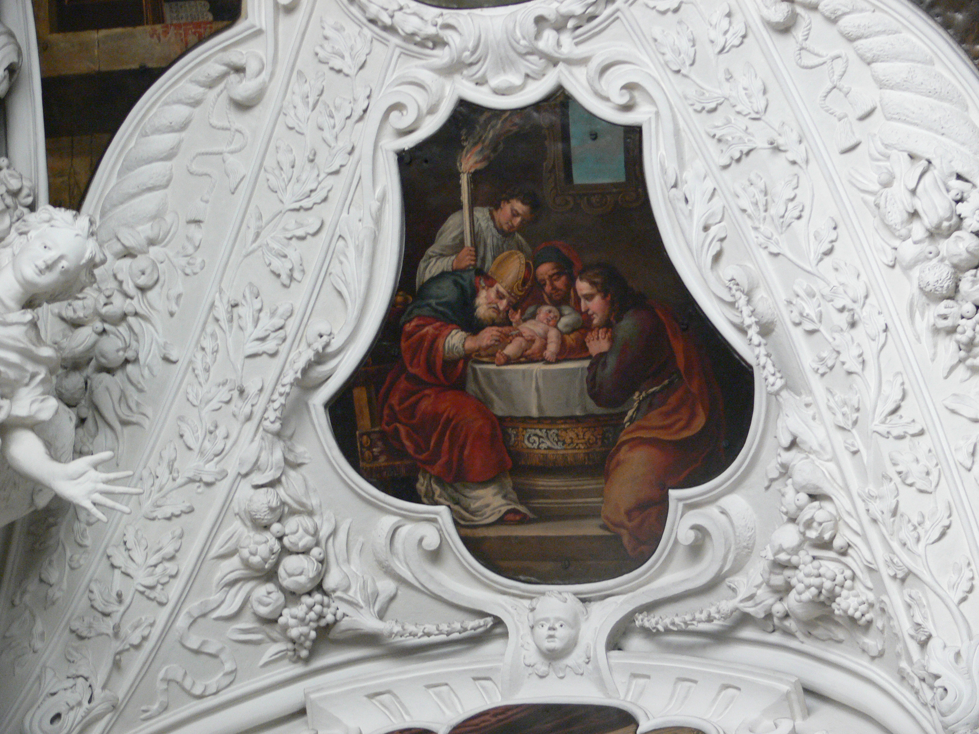 Franziskanerkirche Unserer Lieben Frau, Salzburg Josephskapelle, Deckengemälde Szenen aus dem Leben des Hl. Joseph von Johann Friedrich Beretti, 1704, Beschneidung Christi